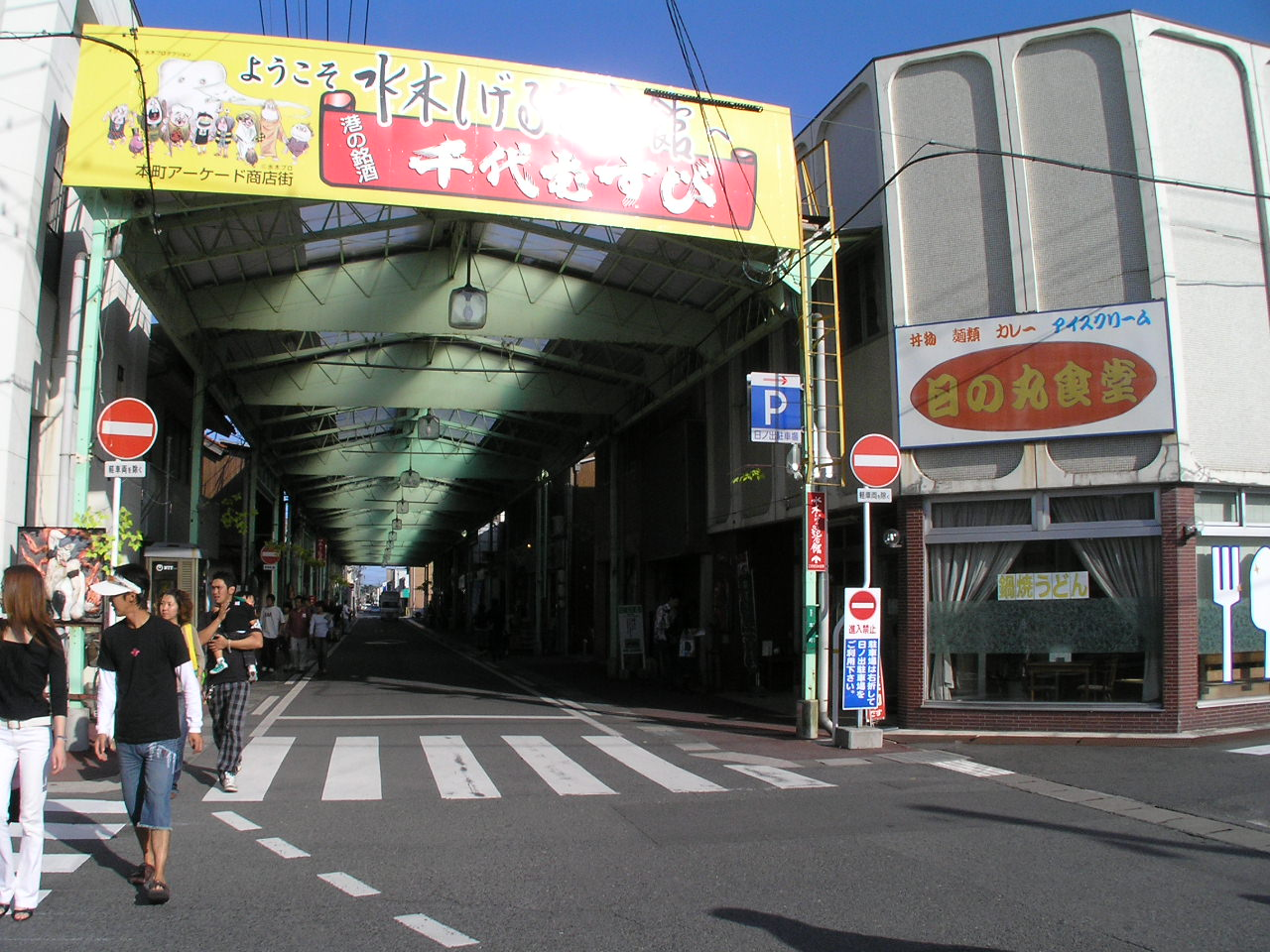 境港本町アーケード商店街 ～photo by Autumn Snake 【おぉたむすねィく探検隊】